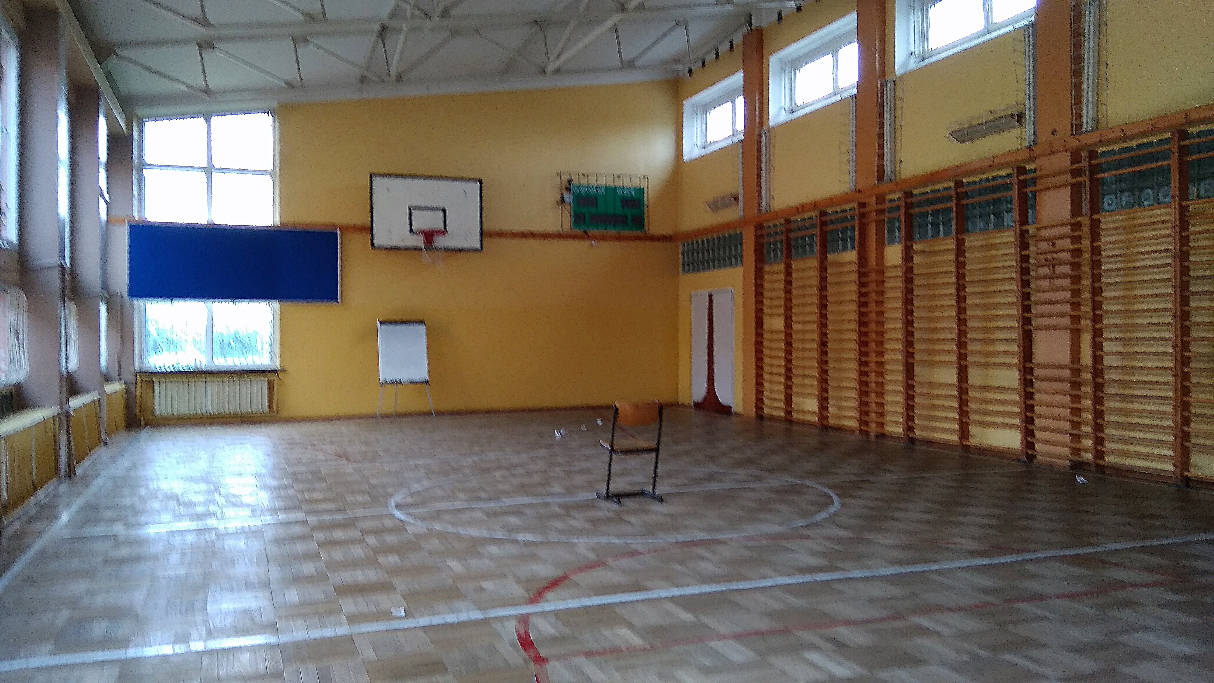 LO w Makowie Maz – część placu budowy, 3.01.2019